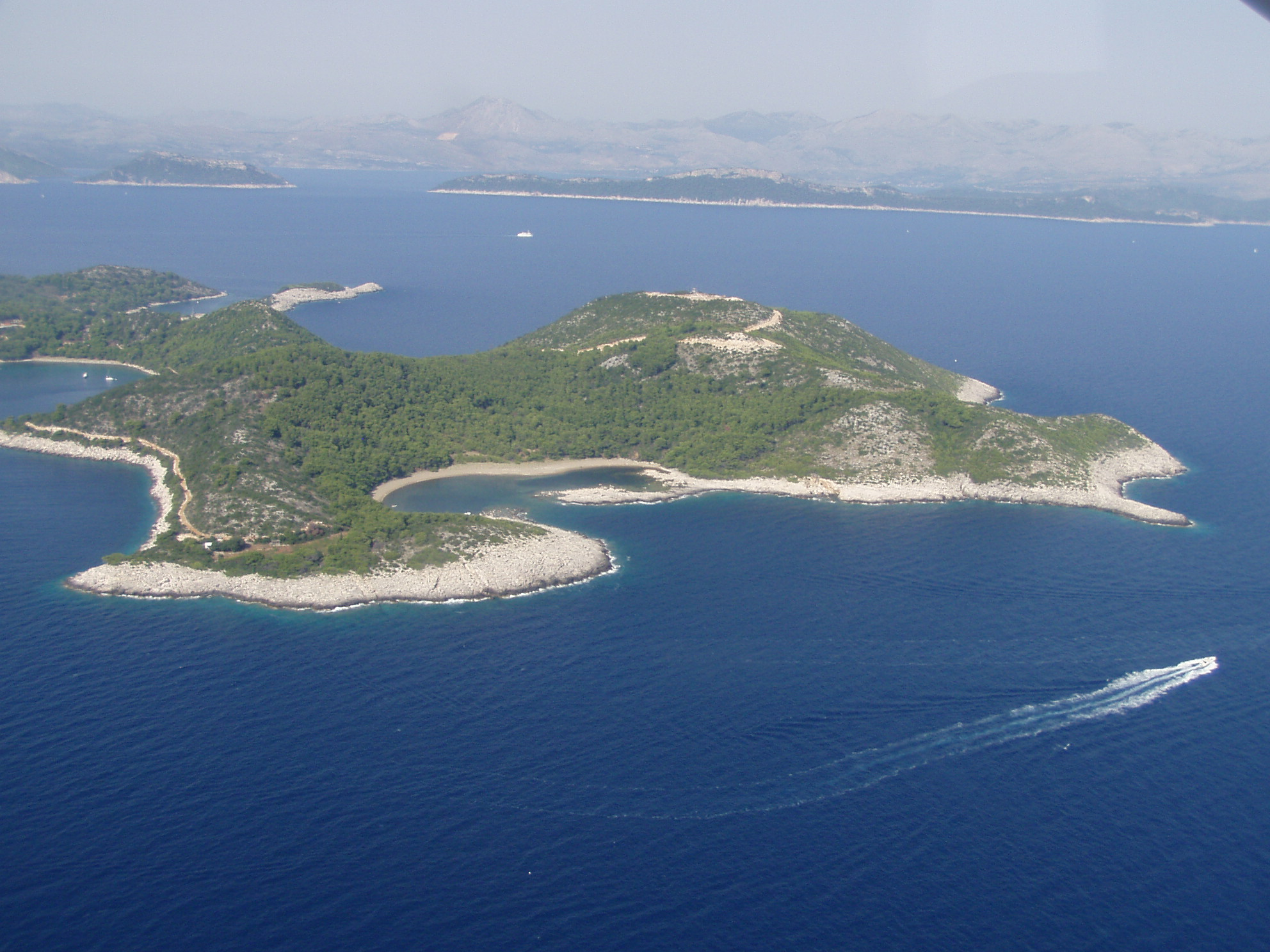 Razvedenost jugoistočne obale Mljeta